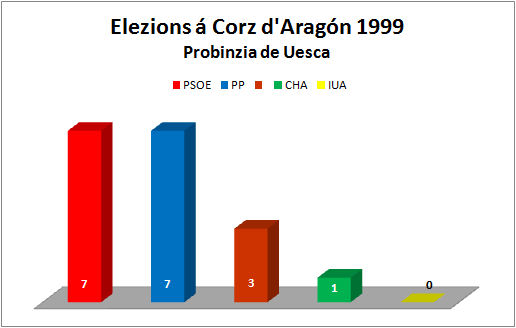 Aragonés: Grafico d'as elezions á Corz d'Aragón de la añada 1999. Resultatos d'a probinzia de Uesca